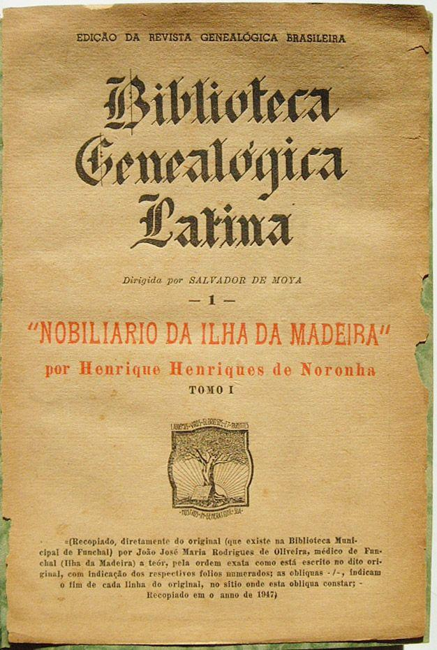 Henrique Henriques de Noronha, Genealogia... Ilha da Madeira, ano de 1700, Revista Genealógica Brasileira, São Paulo, Brasil, 1948.